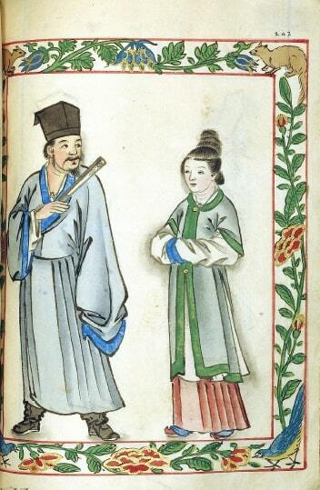 中文（香港）: 1595年的明朝人